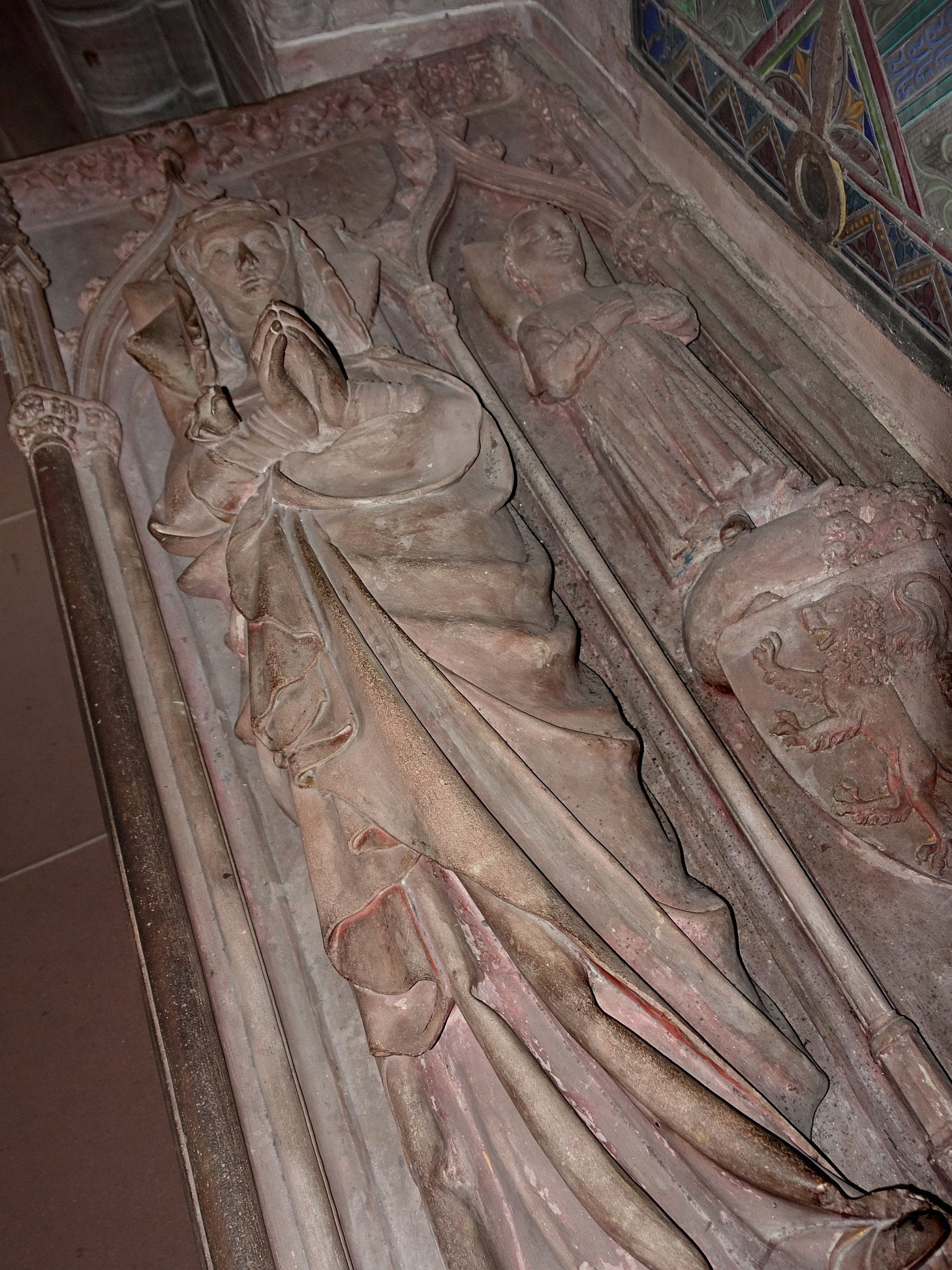 Sarkophag im Basler Münster. Inschrift: Gertrud Anna Gemahlin Rudolfs von Habsburg. Geborene Gräfin von Hohenberg † 1281. Graf Karl von Habsburg, deren Söhnlein † 1276 Tumba Gertruds von Hohenberg und ihres Sohns Karl von Habsburg im Basler Münster, sie zeigt neben dem österreichischen Bindenschild den römisch-deutschen Königsadler und den steirischen Panther